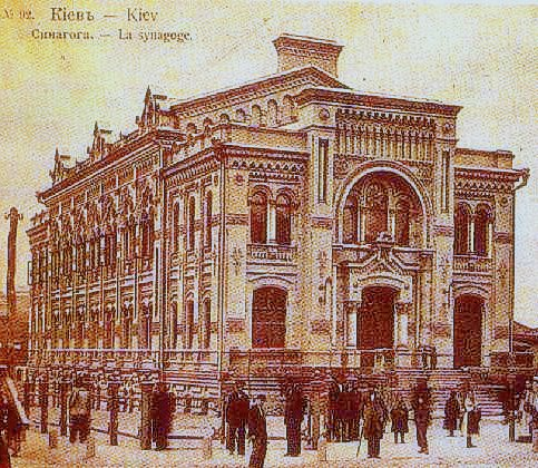 Синагога Бродского вул. Шота Руставели, 13 в Киеве